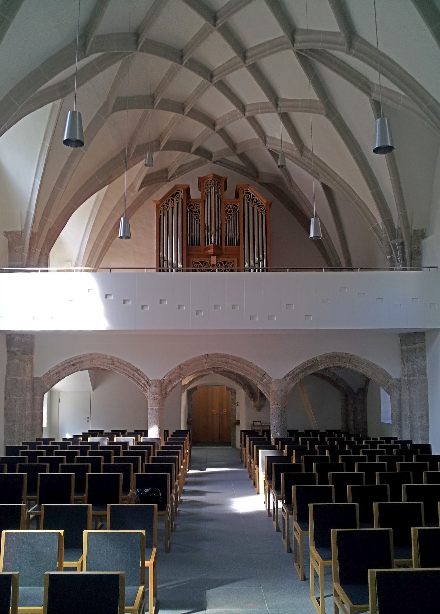 Westempore der Kath. Pfarrkirche hll. Peter und Paul